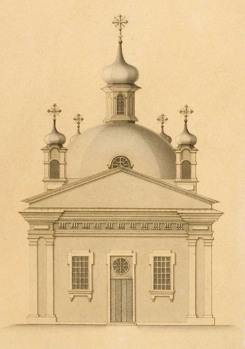 Беларуская (тарашкевіца): Ворша (Vorša), Зааршыньне (Zaaršyńnie). Царква Нараджэньня Божай Маці